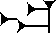 Cuneiform sign